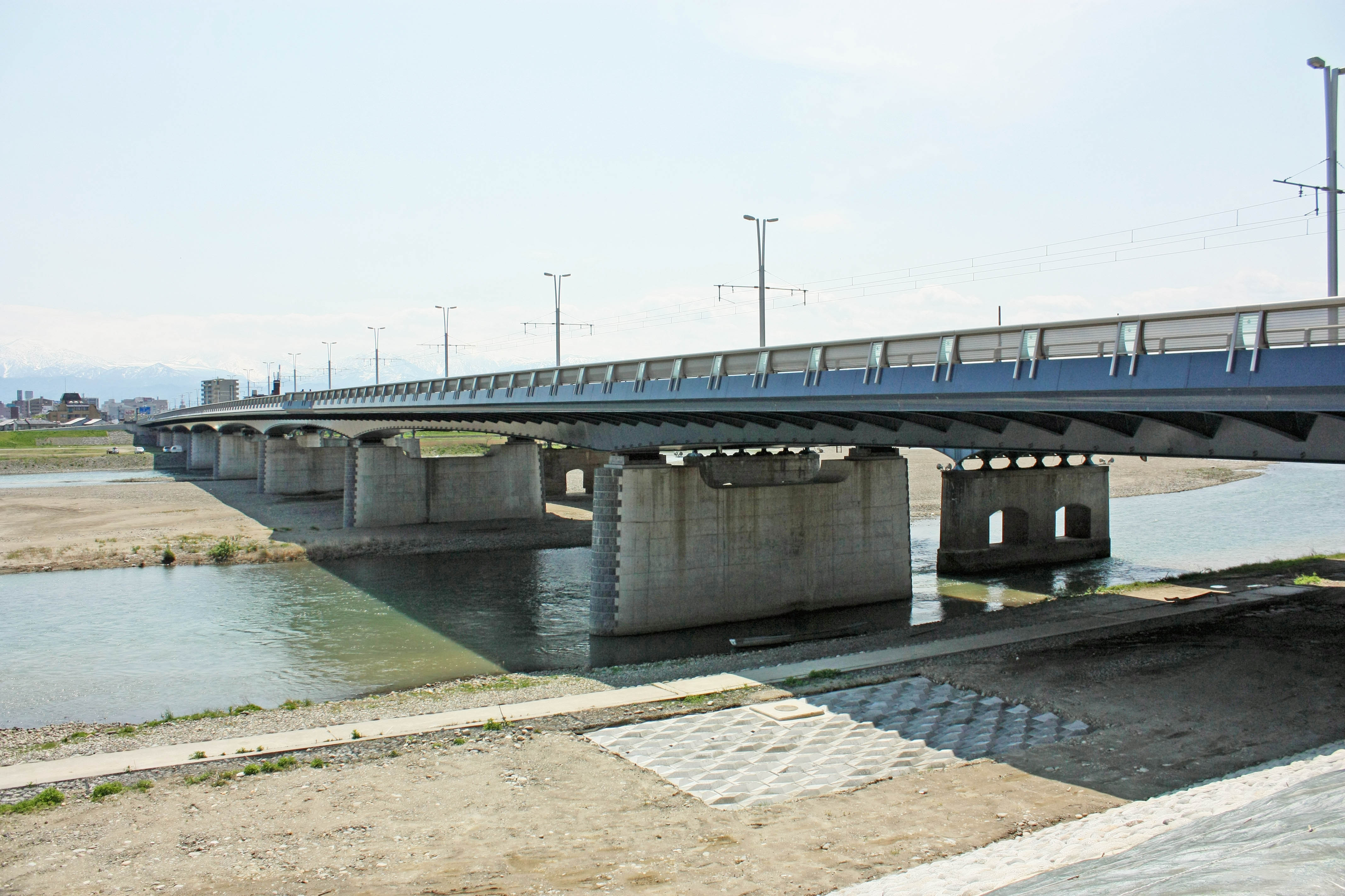 富山大橋（2代目）の写真です。下流側から撮影しました